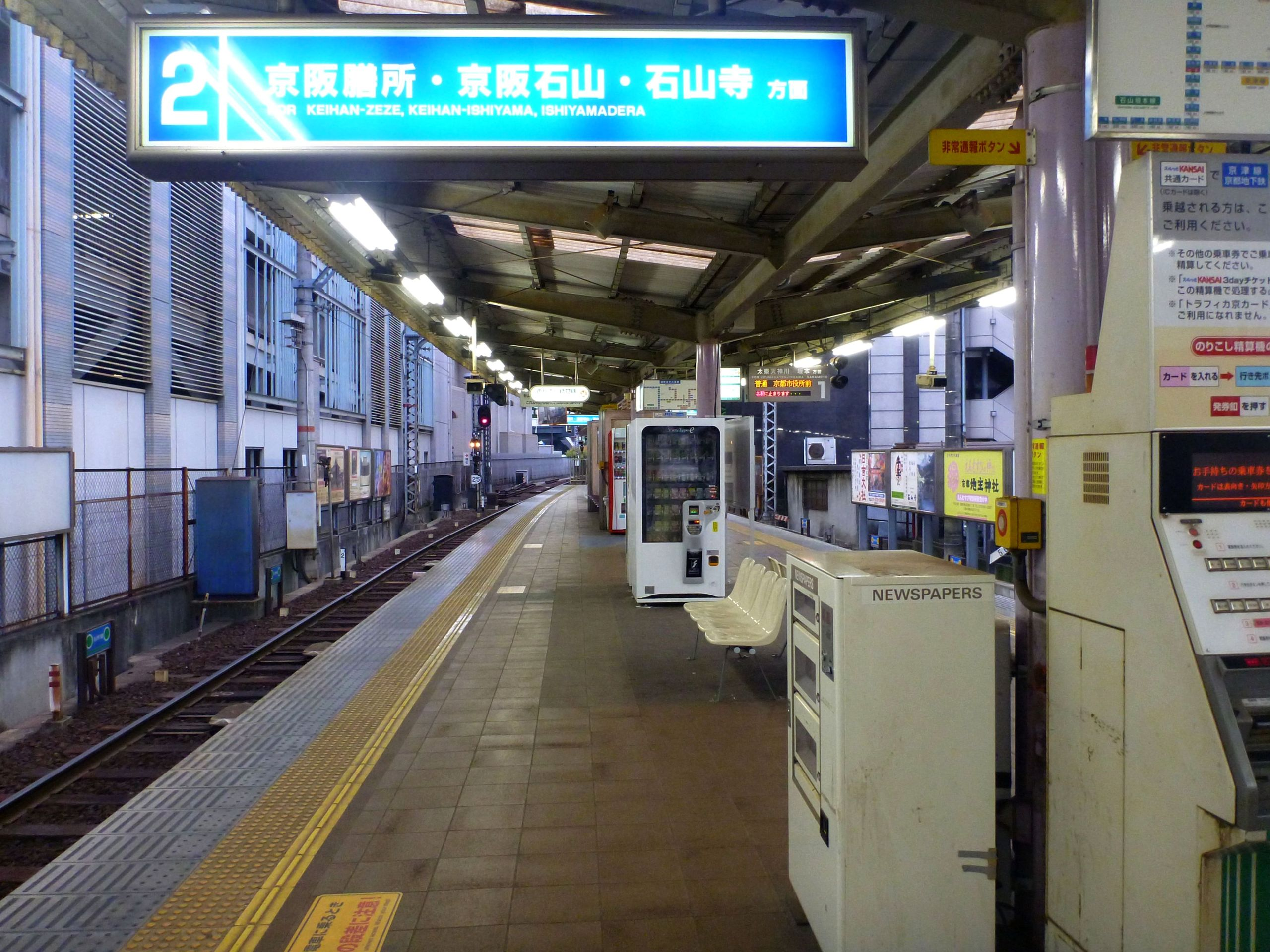 Hama-Otsu Station, Keihan